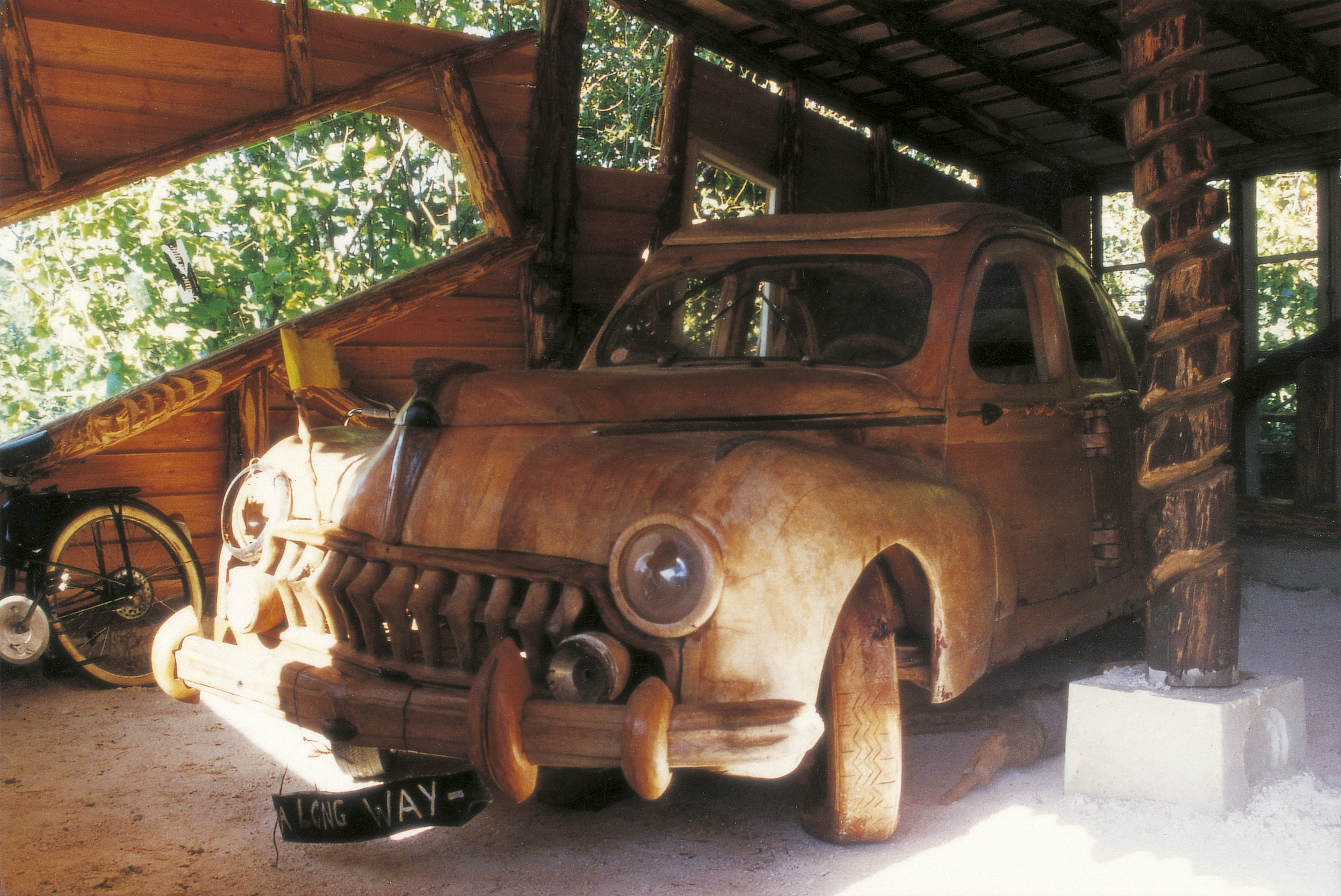 Louis de Verdal (né en 1948), Peugeot 203 grandeur nature, localisation inconnue.